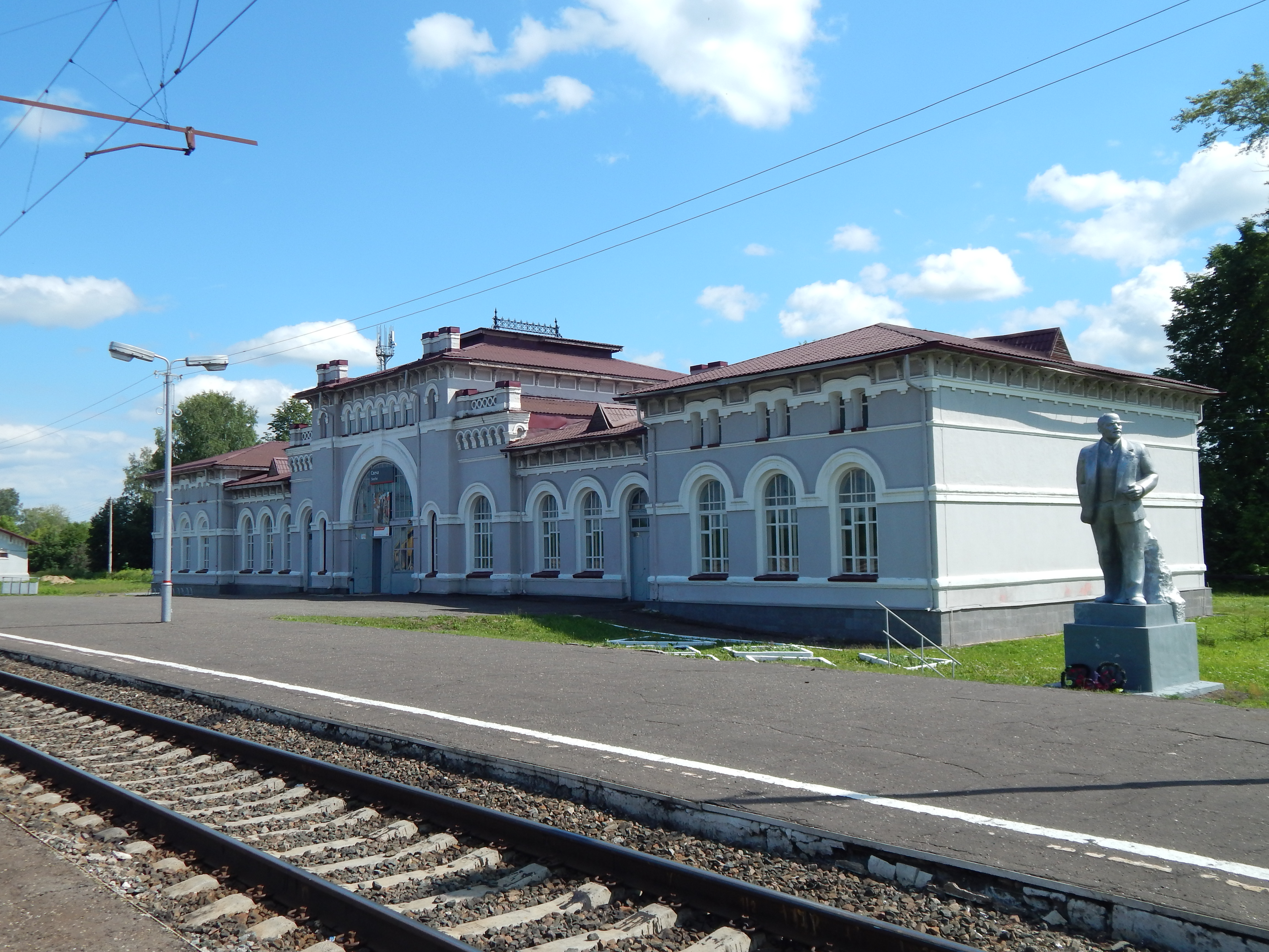 Железнодорожная станция Свеча